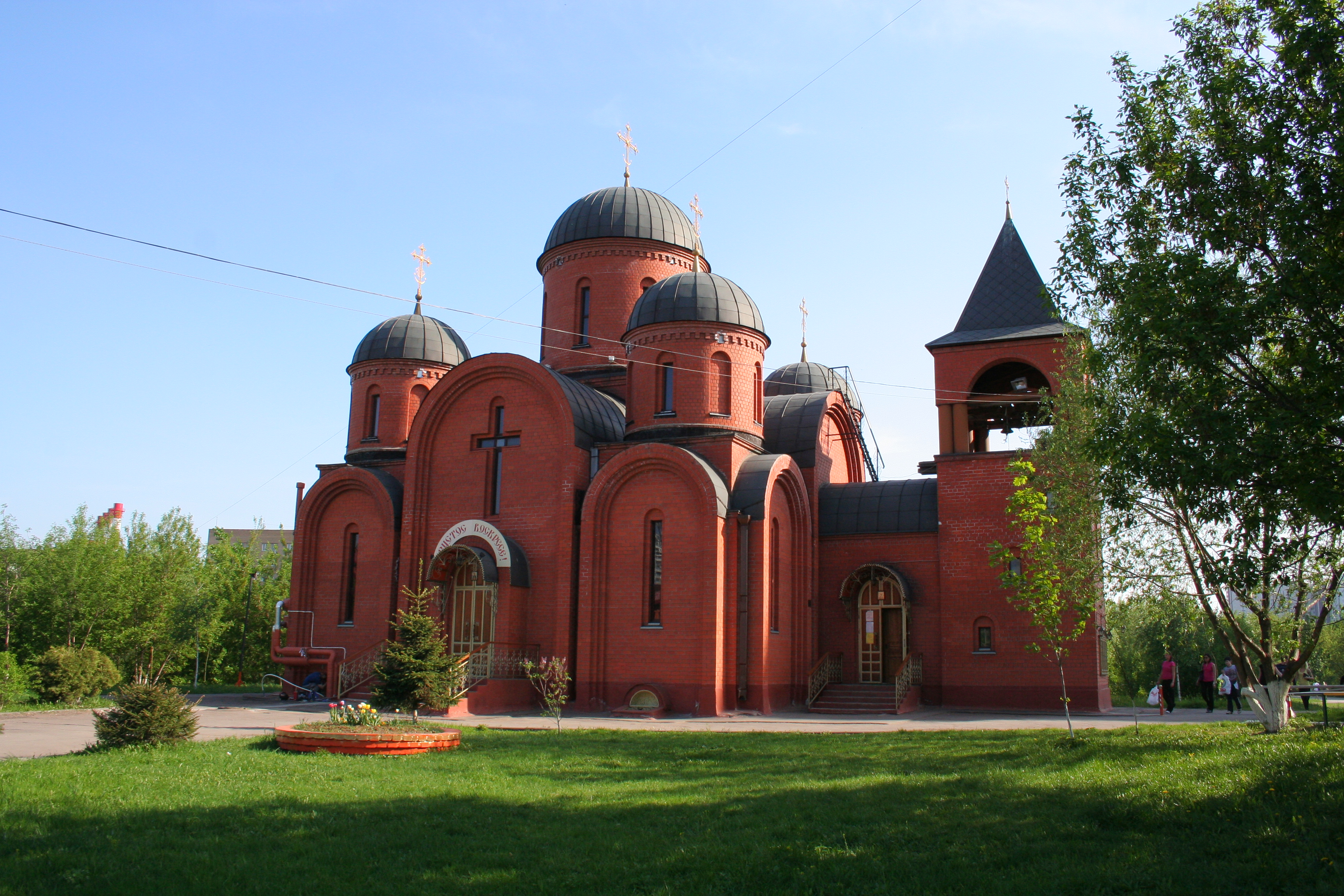 Kirche des Heiligen Nikolaus in Otradnoje, Moskau